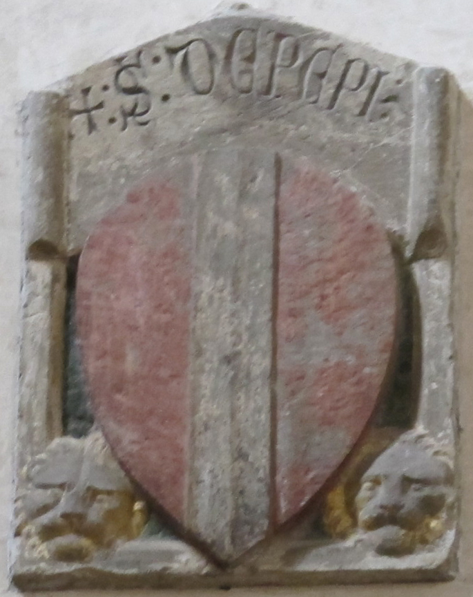 S. croce, stemma pepi